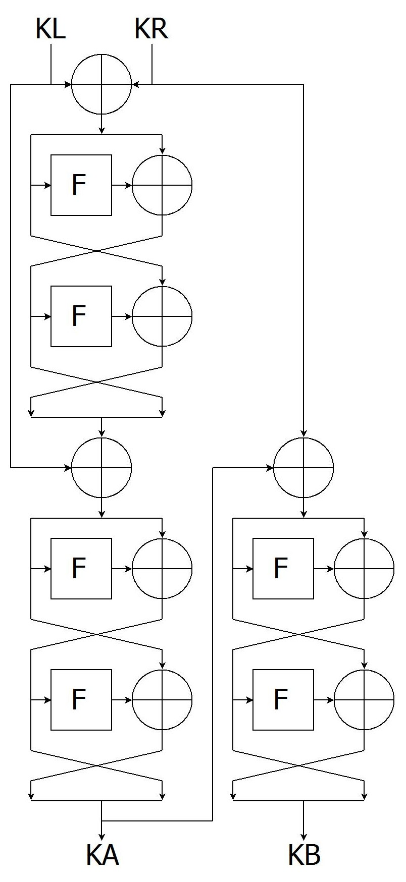 Схема генерирования вспомогательных значений Ka и Kb, используемых в алгоритме шифрования Camellia